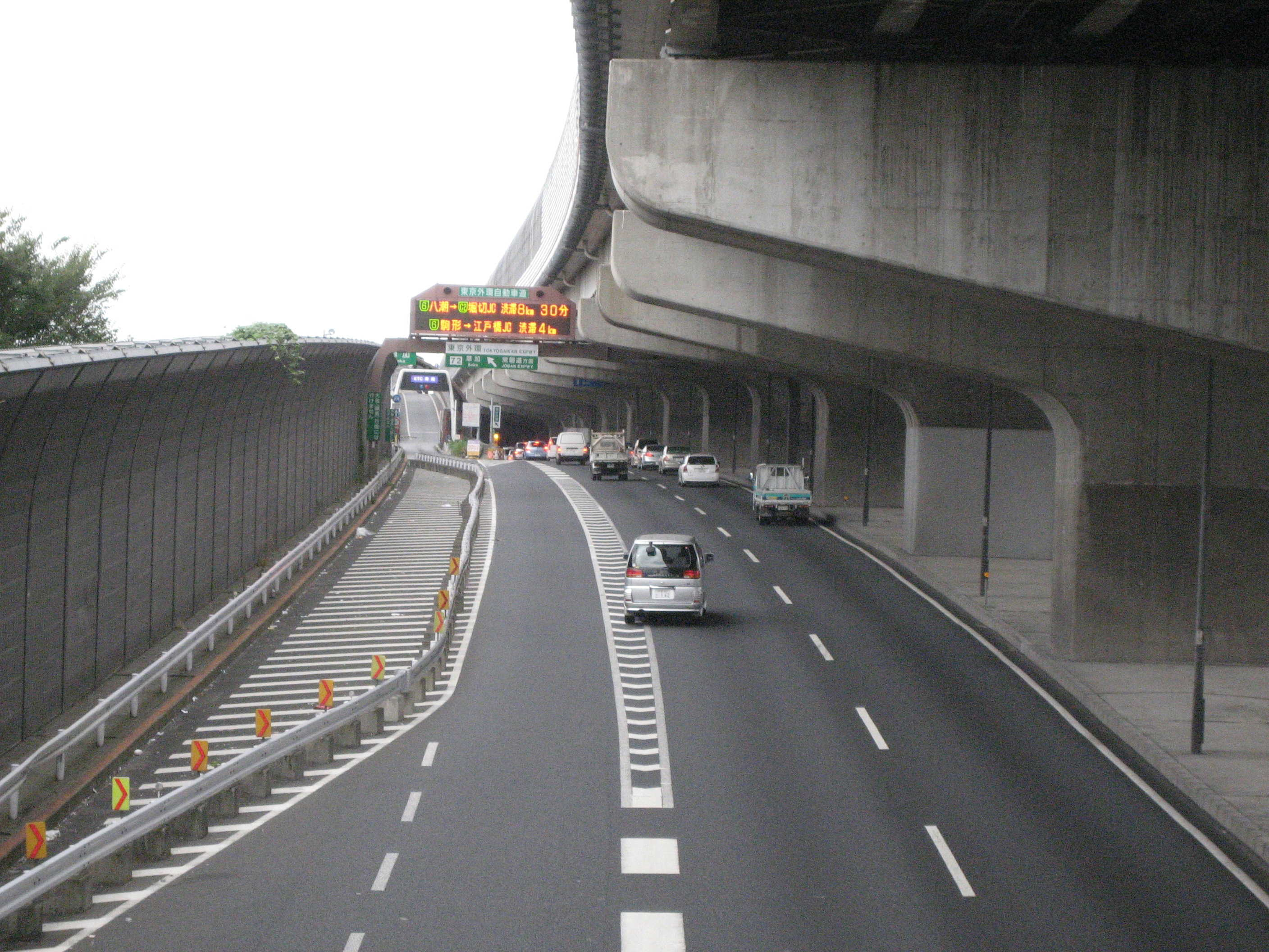 国道298号線の本線（草加市）.三郷方面本線